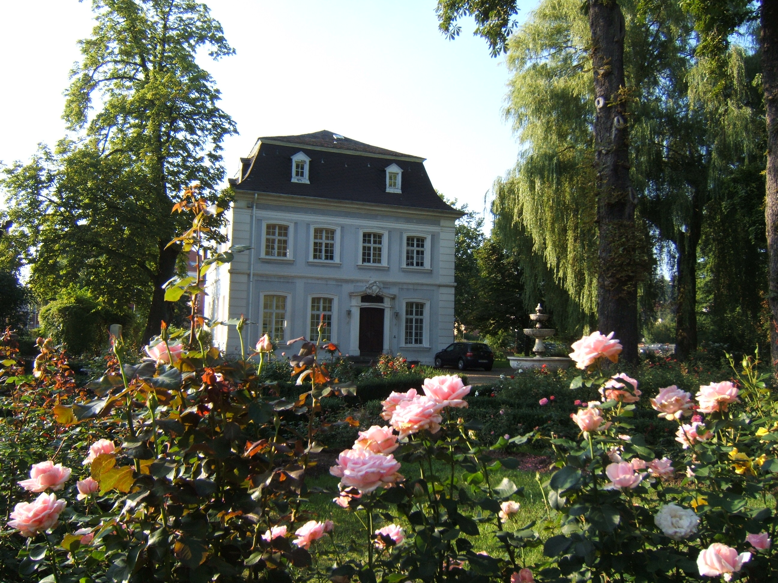 Stengel-Pavillion, Sitz der Superintendentur Saar-Ost, und Barockrosengarten in Ottweiler